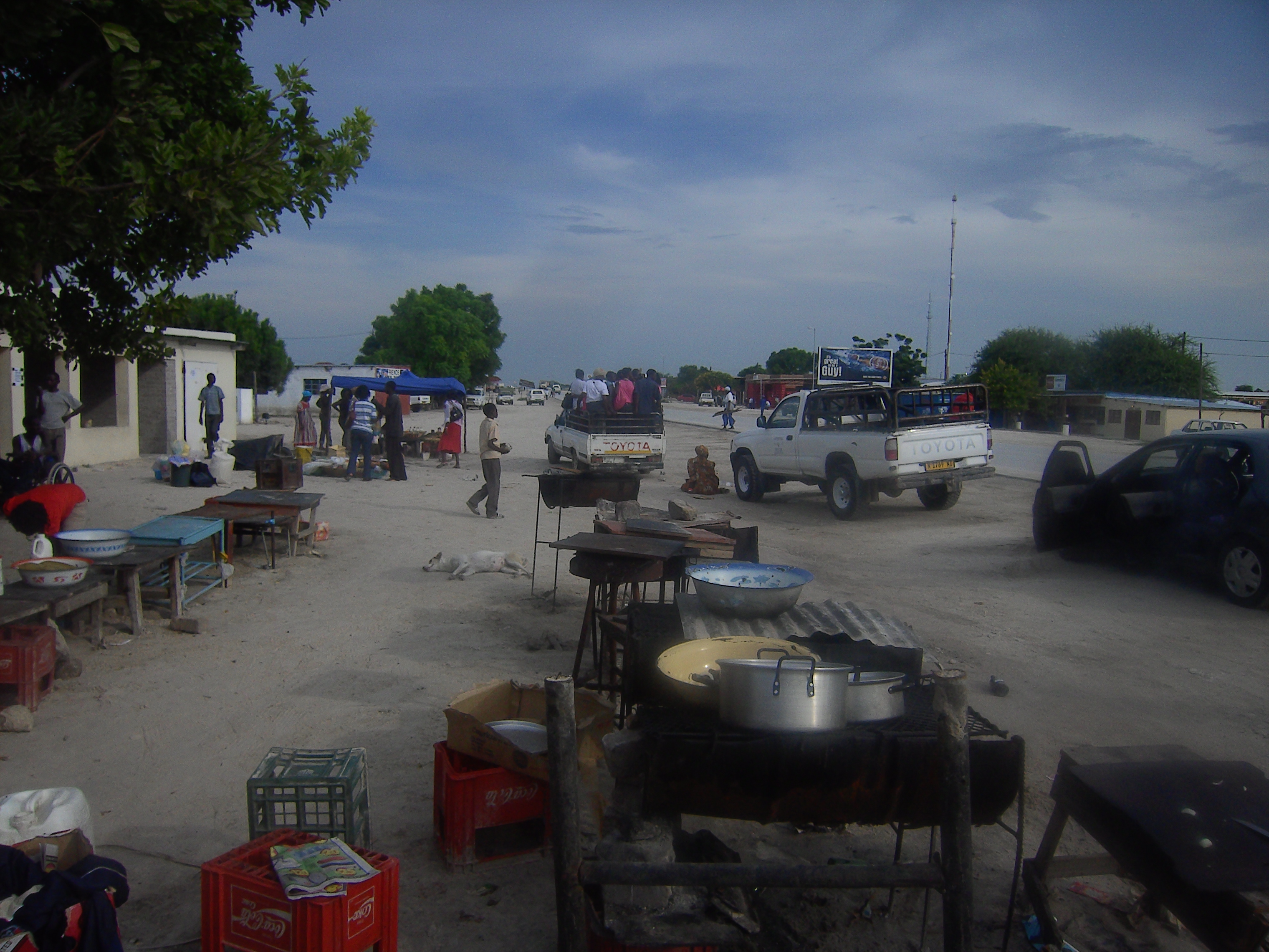 Hauptstrasse von Omuthiya mit regem Markttreiben (2011).